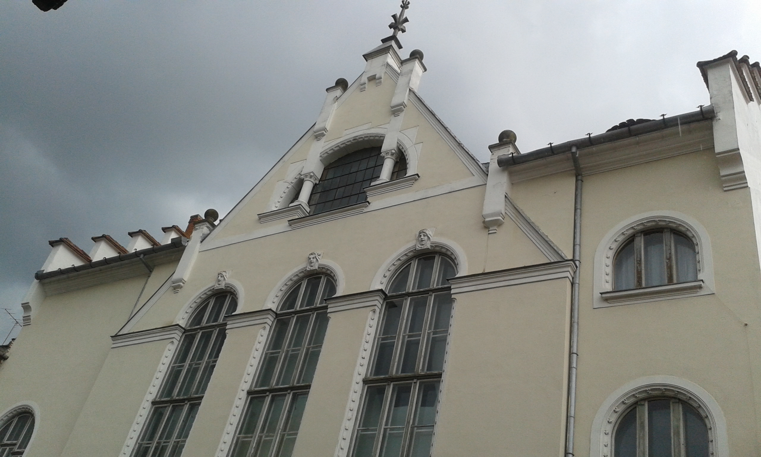 Fostul cinematograf Arta